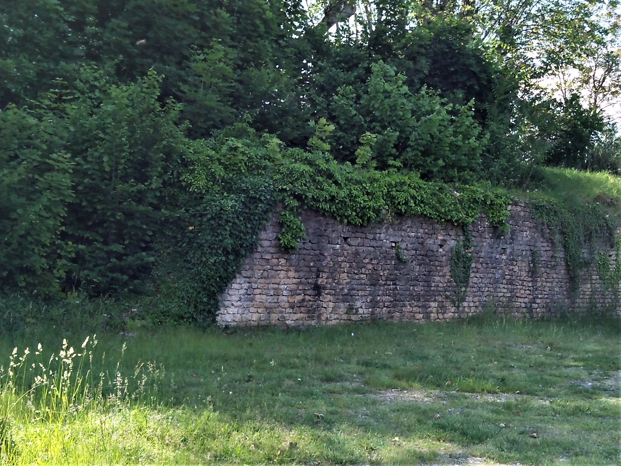 Autre vue du mur antique de Bourgoin-Jallieu en mai 2019